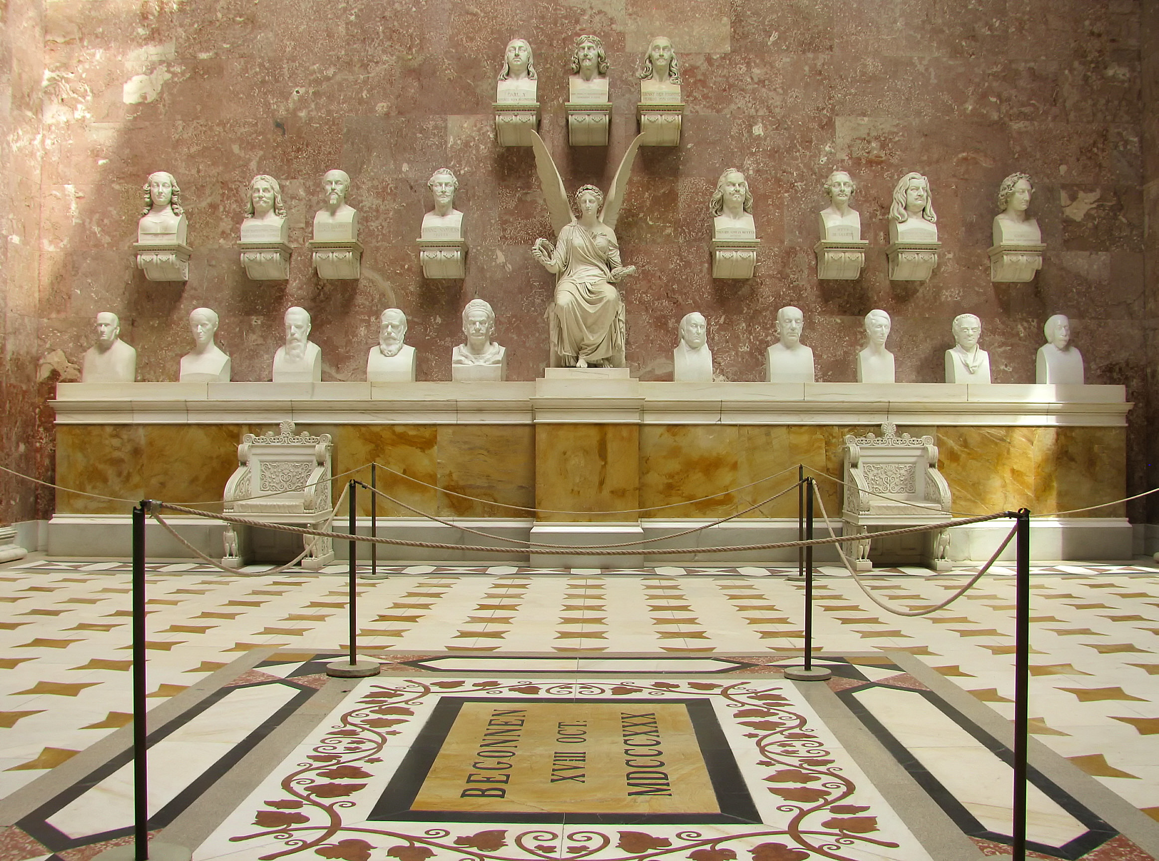 Innenansicht Walhalla (Marmorbüsten)